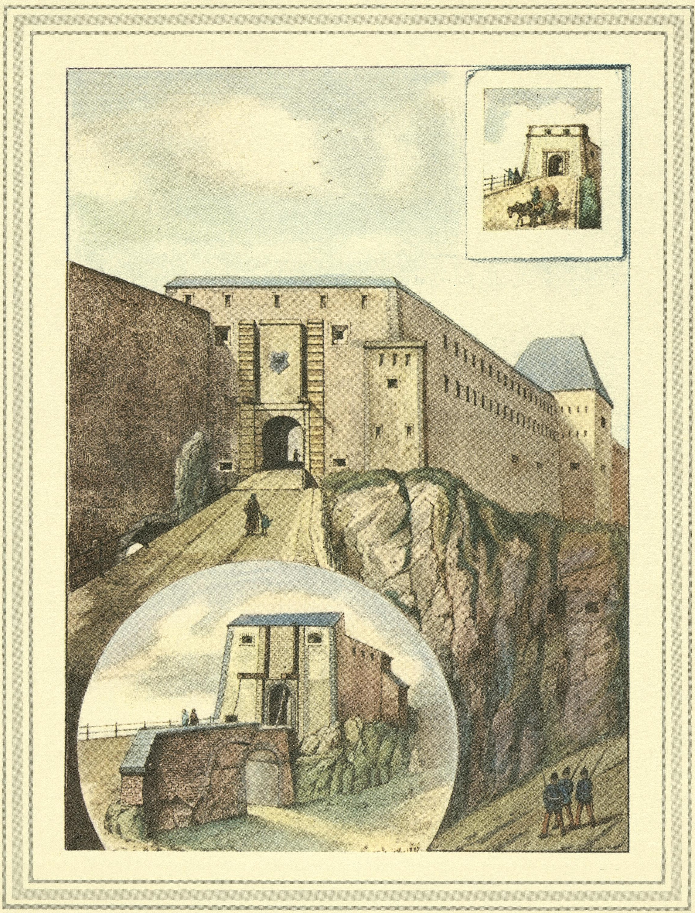 Dessin pittoresque de la forteresse de la Confédération germanique (Bundesfestung) Luxembourg par Michel Engels (1851-1901): XIII - Les portes du Bock